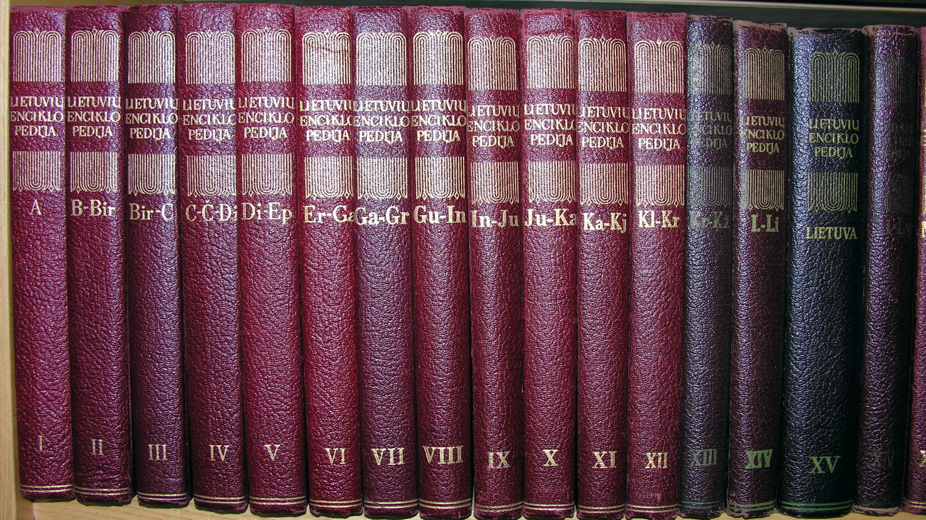 Lietuvių enciklopedija Bostonas, JAV. 1953-1987 m. 1-37 t.